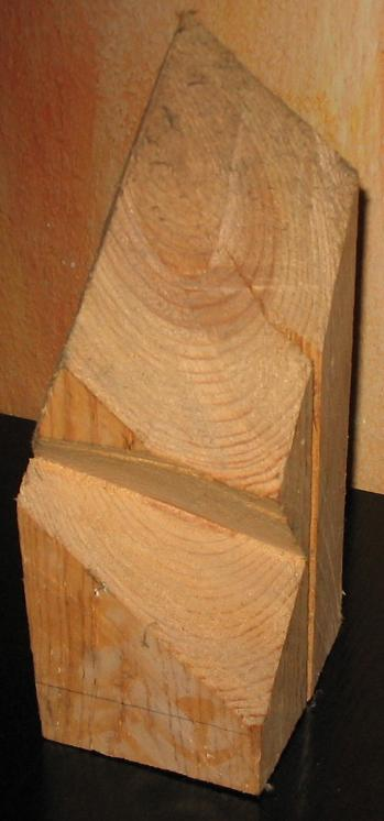 Firstpunkt eines Gratsparrens, Übungsstück.